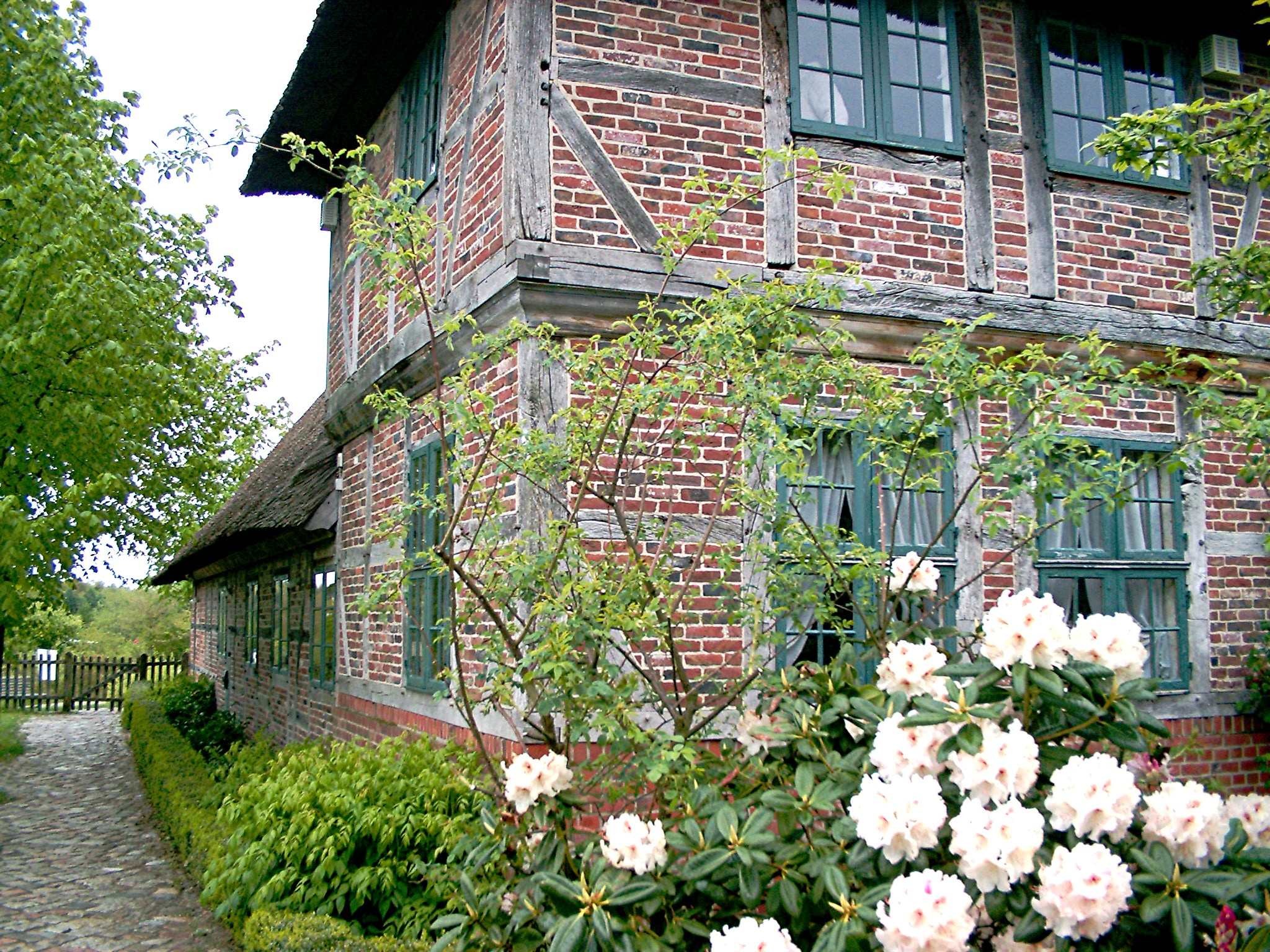 Freilichtmuseum am Kiekeberg